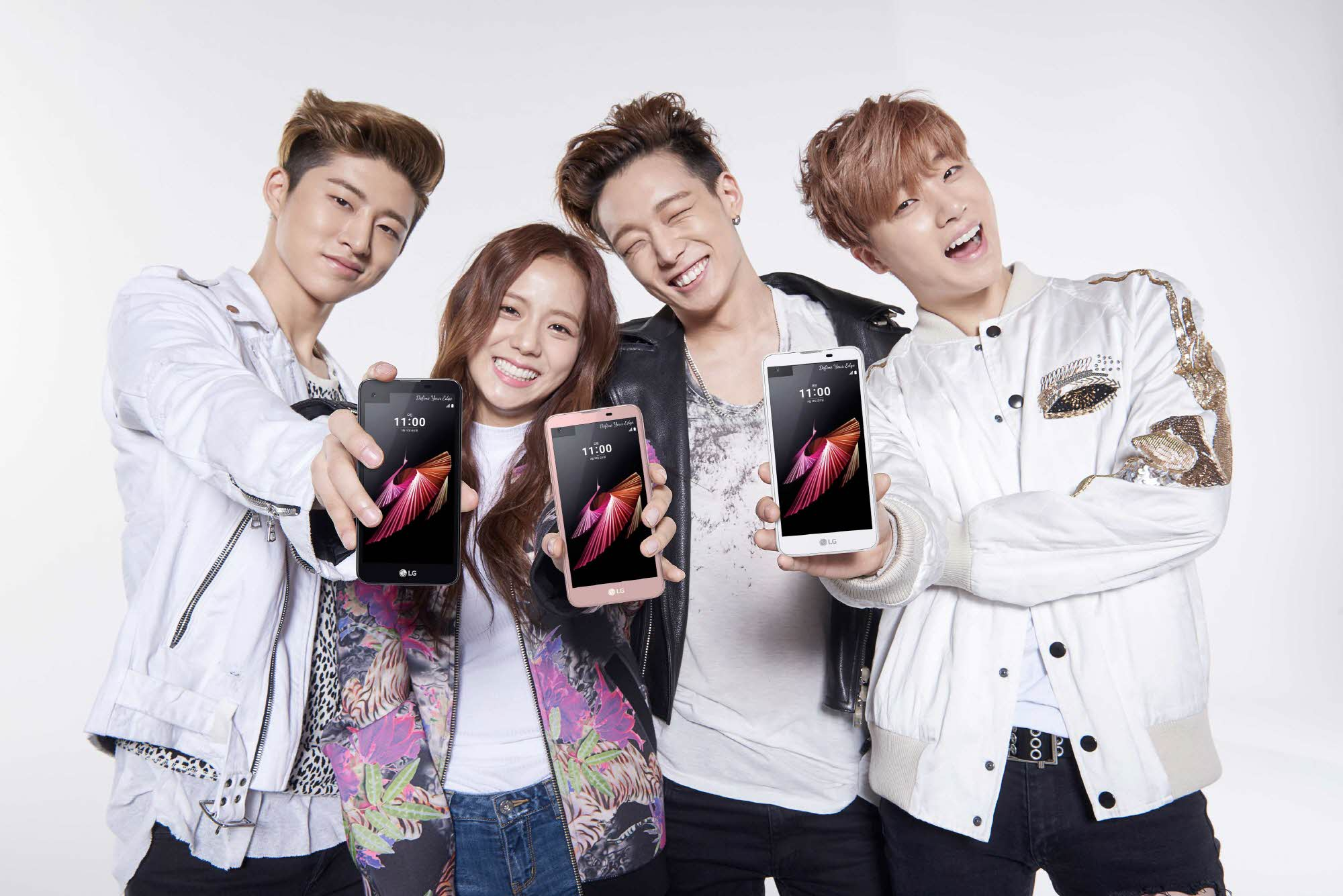 ■ 프리미엄 스마트폰의 핵심 하드웨어를 모델별 탑재 □ ‘X 스크린’, ‘V10’서 적용한 ‘세컨드 스크린’ 채택 □ ‘X 캠’, ‘G5’서 선보인 후면 ‘듀얼 카메라’ 적용 ■ 한국 시작으로 글로벌 출시 ※ Social LG전자 ( 에서 관련 보도자료를 확인하실 수 있습니다.